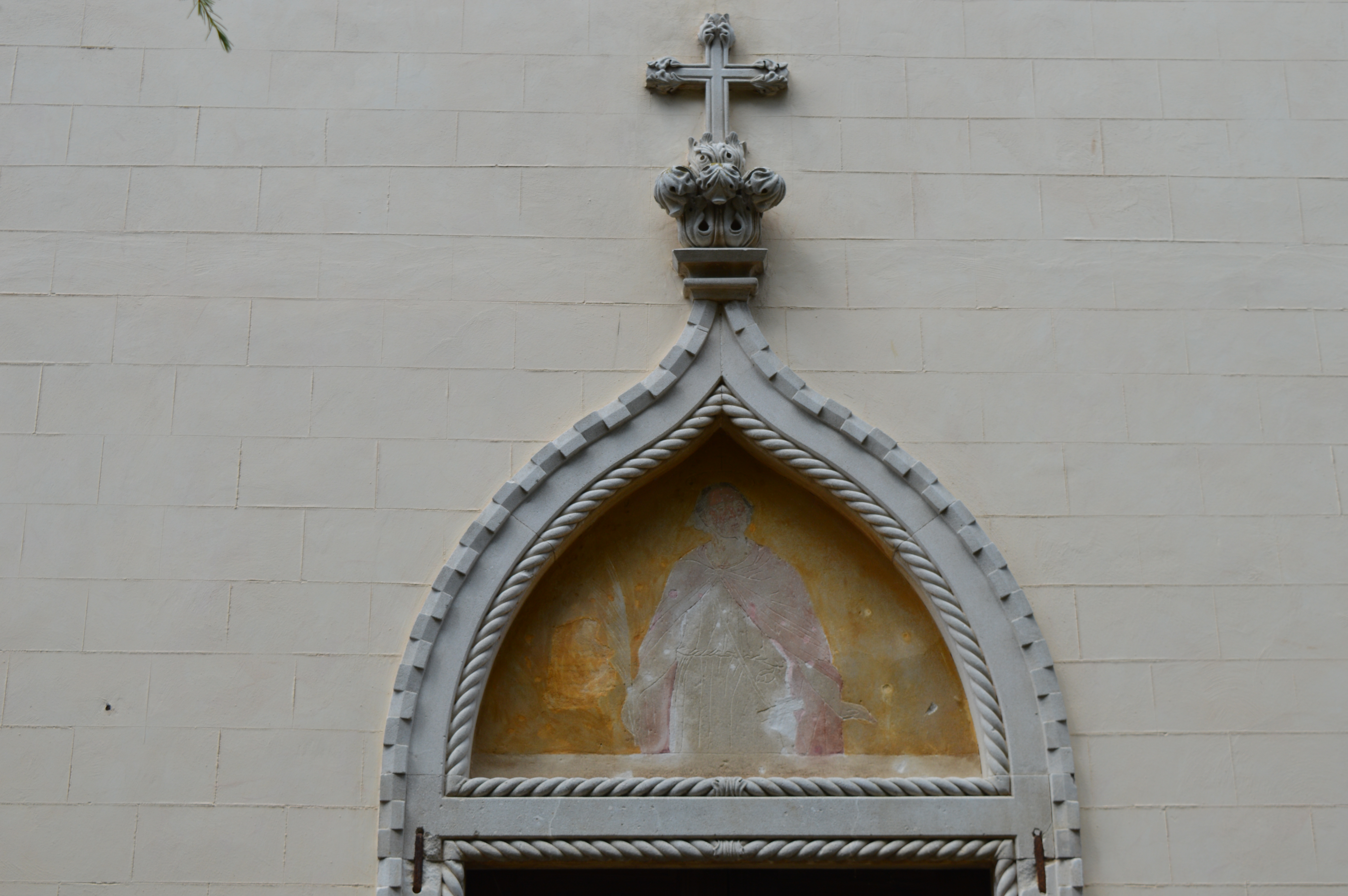 Timpano della porta laterale della chiesa longobarda di San Giorgio Martire a Costabissara, in provincia di Vicenza.